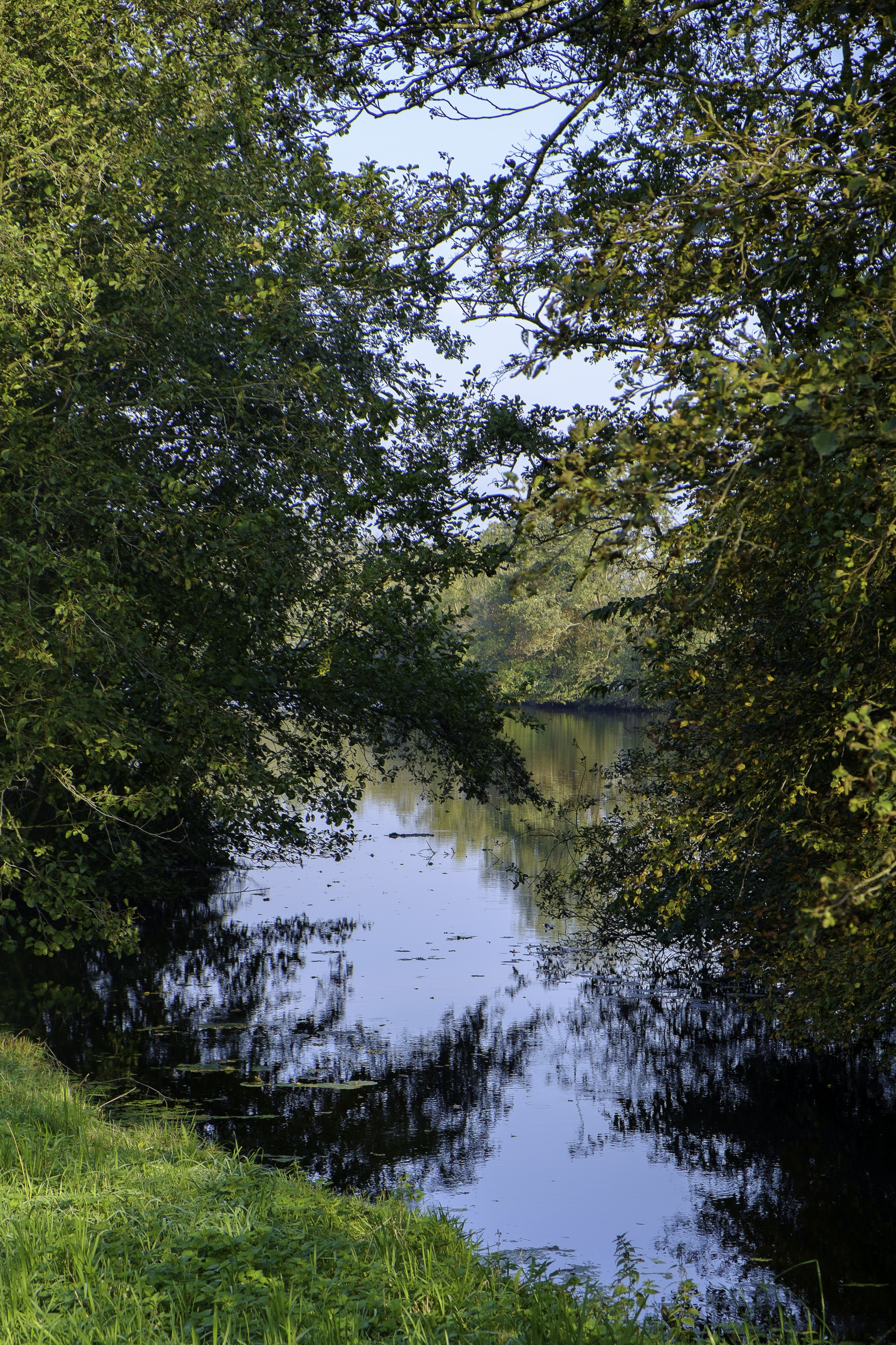 Trekgat in de Noordlaarder Oostpolder